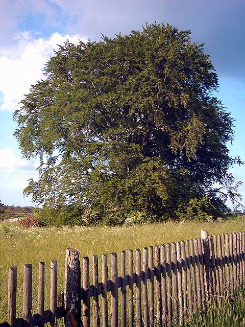 Pondorf (Bayern, Altmühltal): Die Bavariabuche im Frühsommer